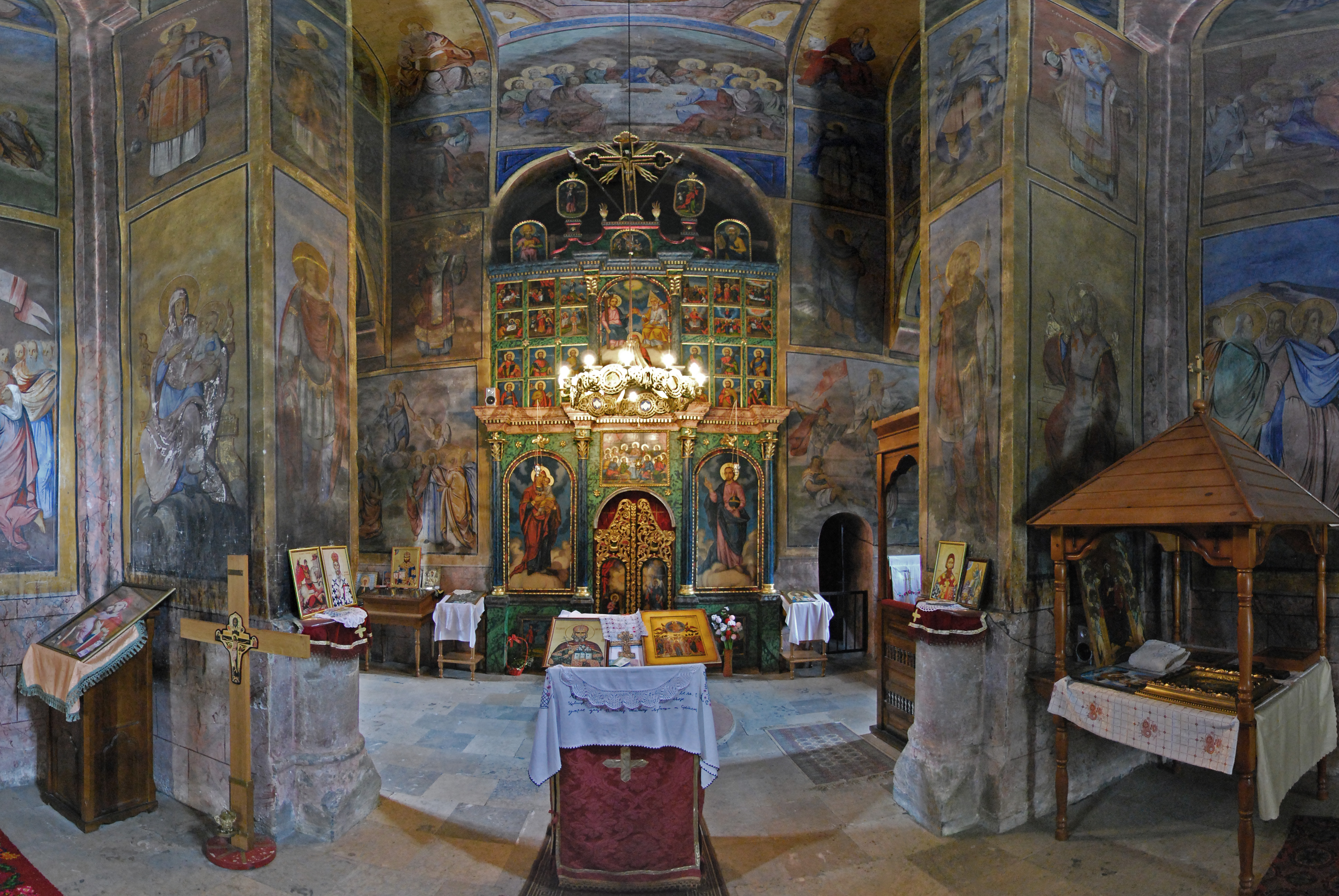 Унутрашњост манастира Рача